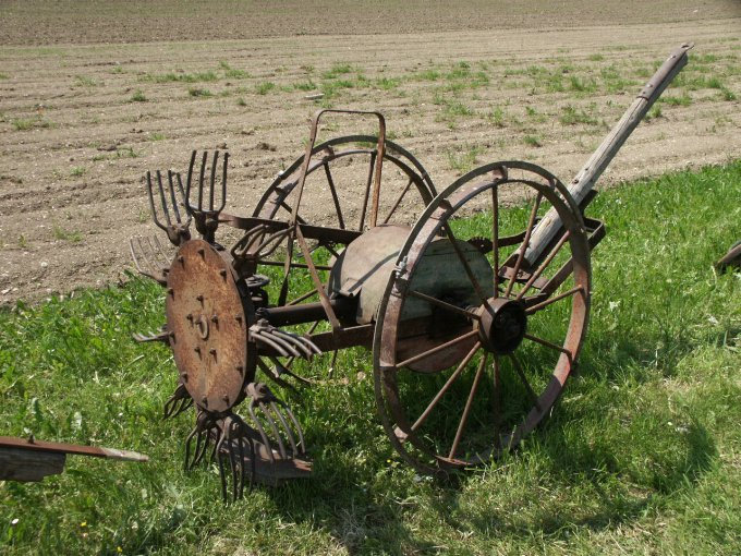 Kartoffelroder mit Radantrieb